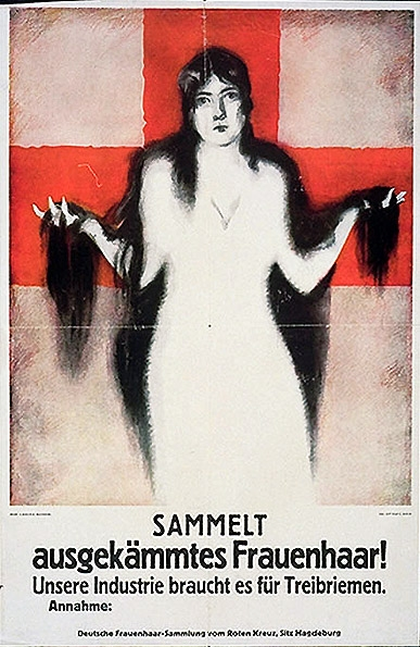 Plakat "Sammelt ausgekämmtes Frauenhaar"